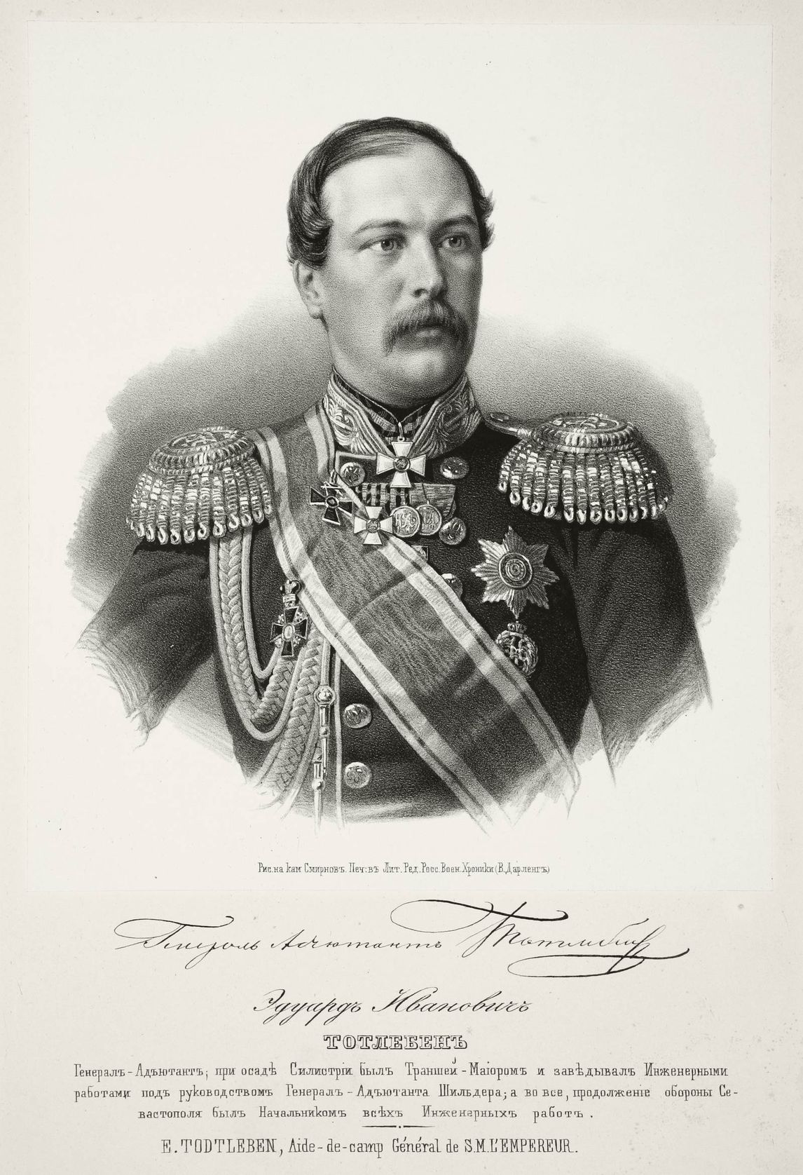 генерал-инженер Е. И. Тотлебен